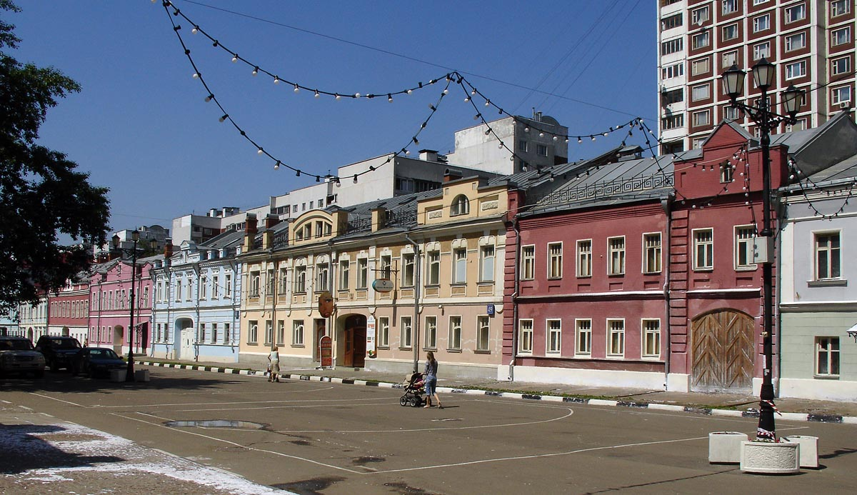 Shkolnaya Street, Moscow